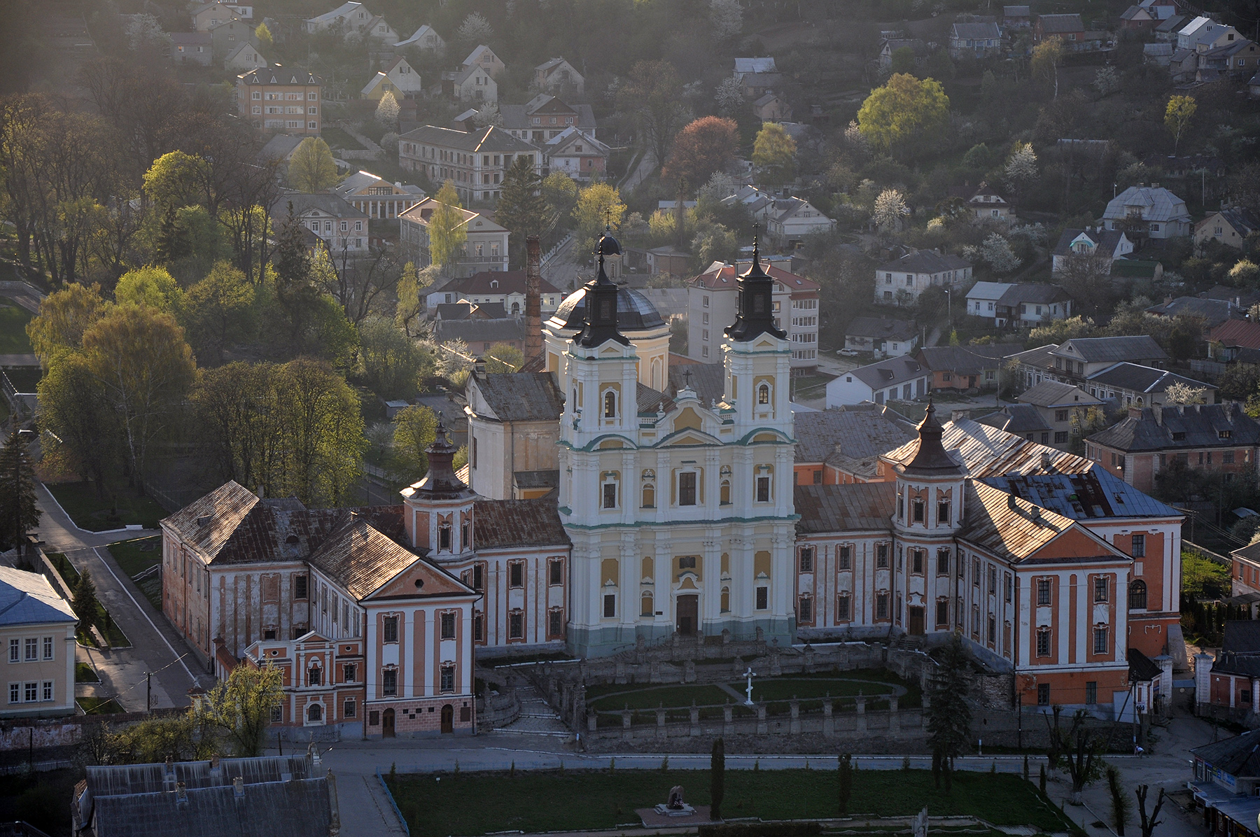 Ансамбль колегіуму, який відвідав поет, письменник, художник Шевченко Тарас Григорович, Кременець, вул. Ліцейна, 1